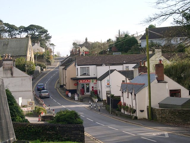 Pelynt